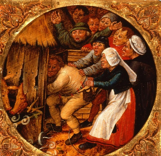 Der bestrafte Wüstling.